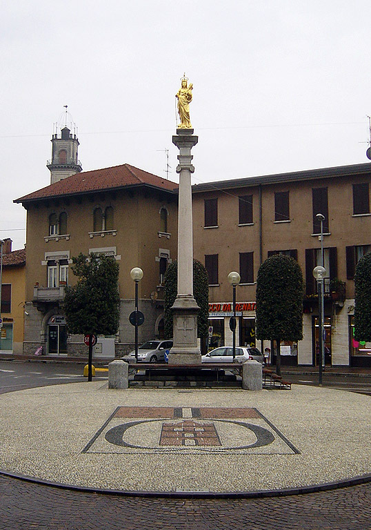 Giussano